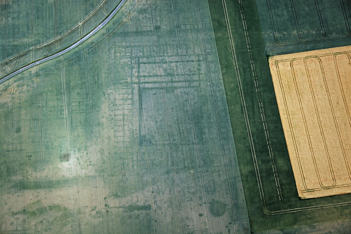 Das Stabsgebäude des neronischen Lagers Vetera Castra I am niederrheinischen Limes auf dem Fürstenberg südlich von Xanten, NRW. Errichtet in mehreren Bauphasen zwischen 12 v. Chr. bis 69/70 n. Chr.